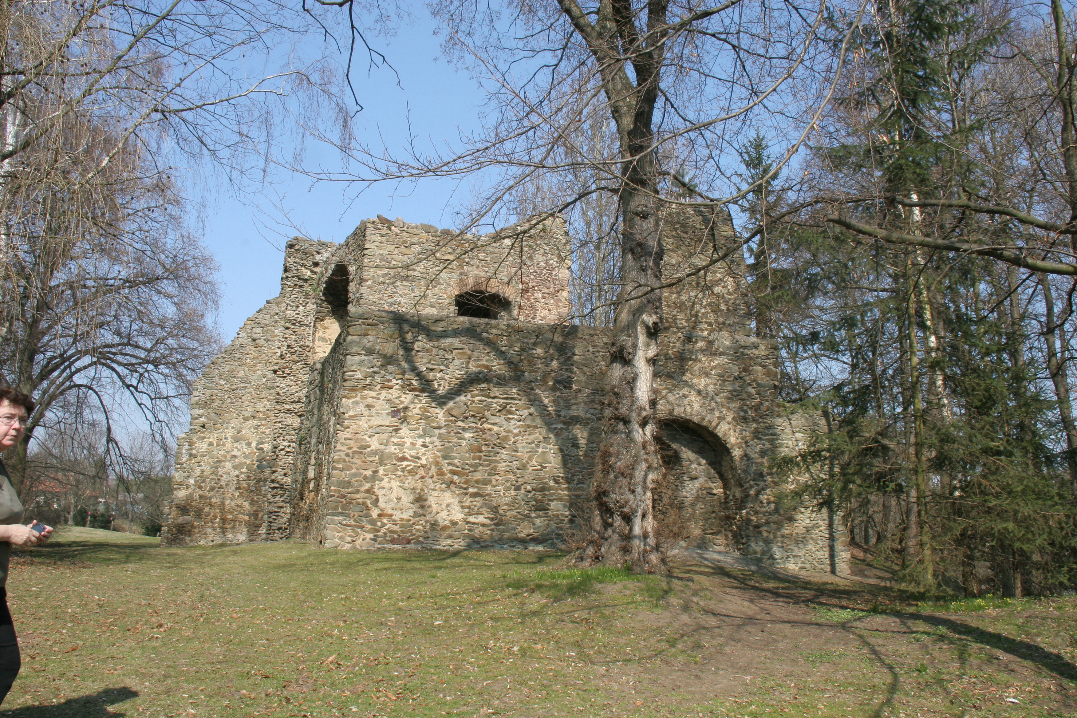 Tvrz, zřícenina a archeologické stopy (Svojšice), nad potokem uprostřed vsi, Svojšice